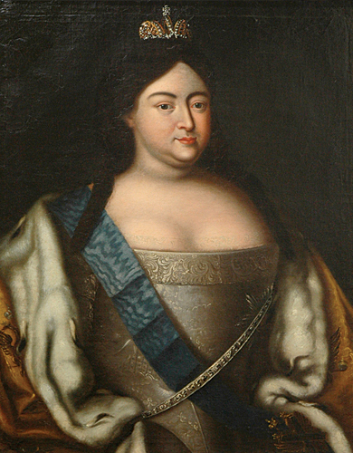 Холст, масло.